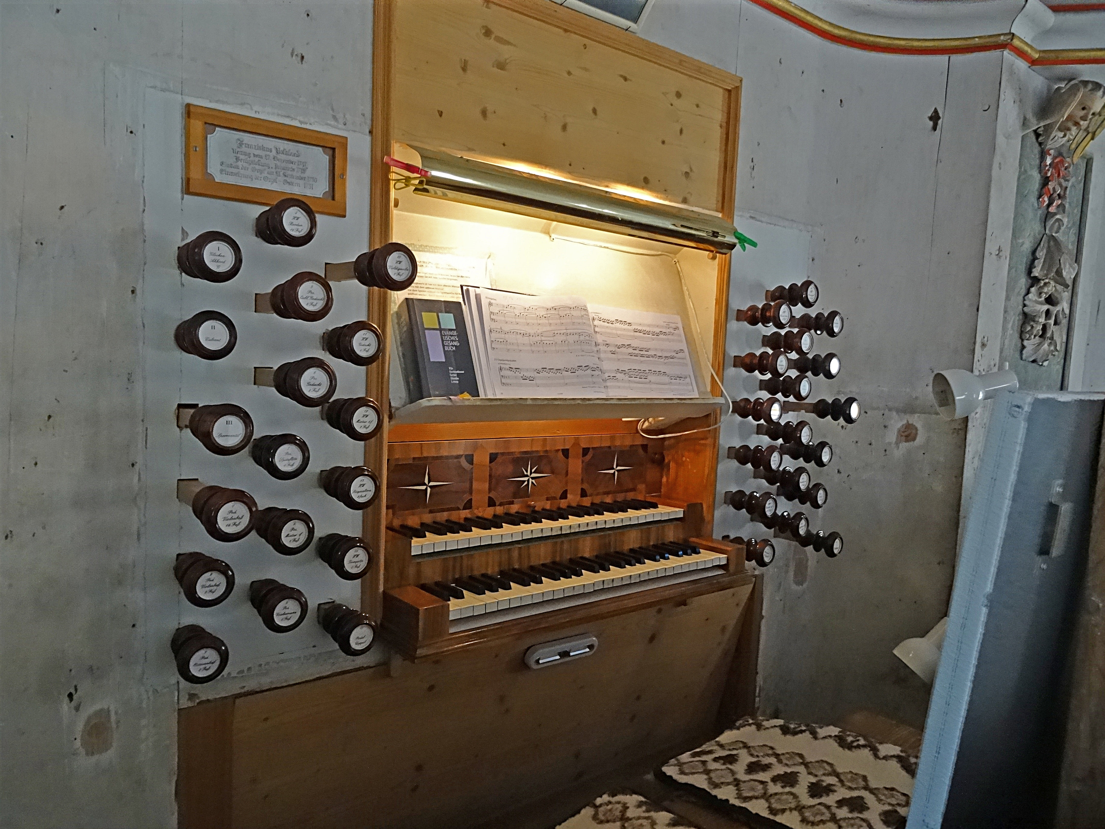 Spieltisch der Volckland-Orgel (1747–1751, IIP/27) in der Dorfkirche St. Peter und Paul (Elxleben, Ilm-Kreis)